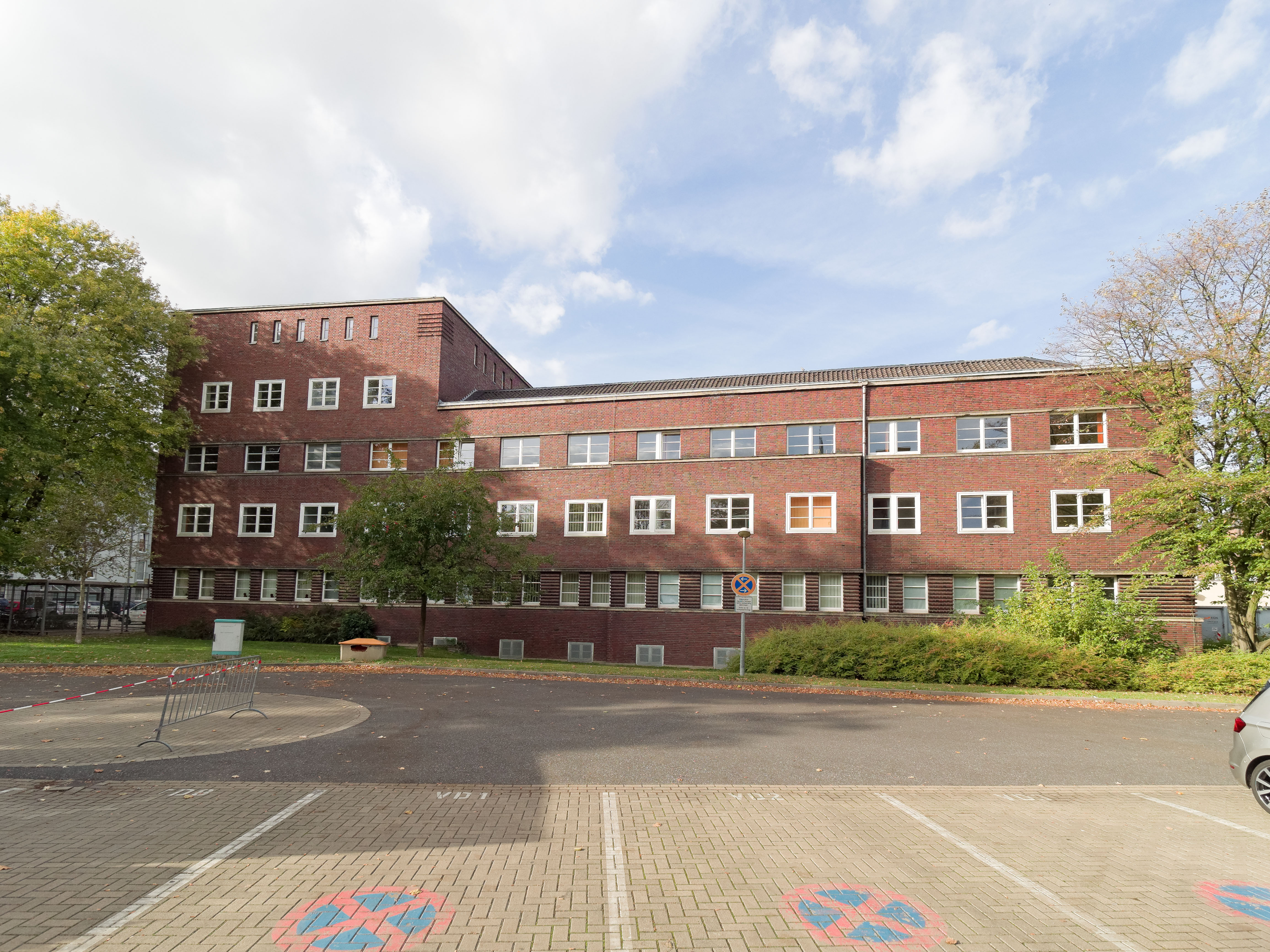 Krefeld Denkmal 996: Klinikkapelle